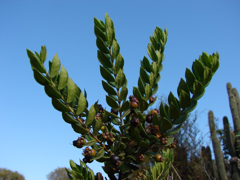 Luma chequen